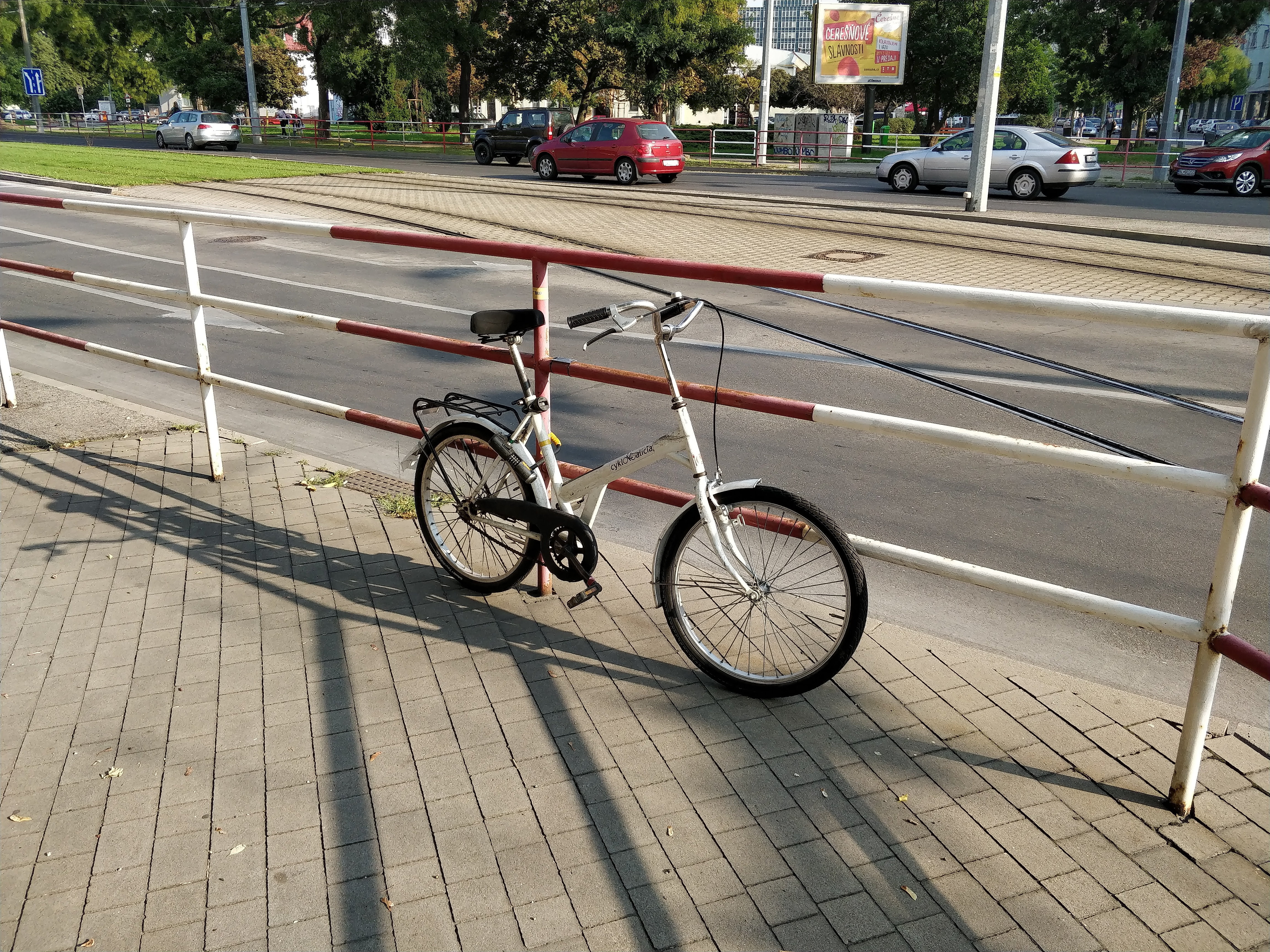 White Bikes docking station Saleziáni, Bratislava